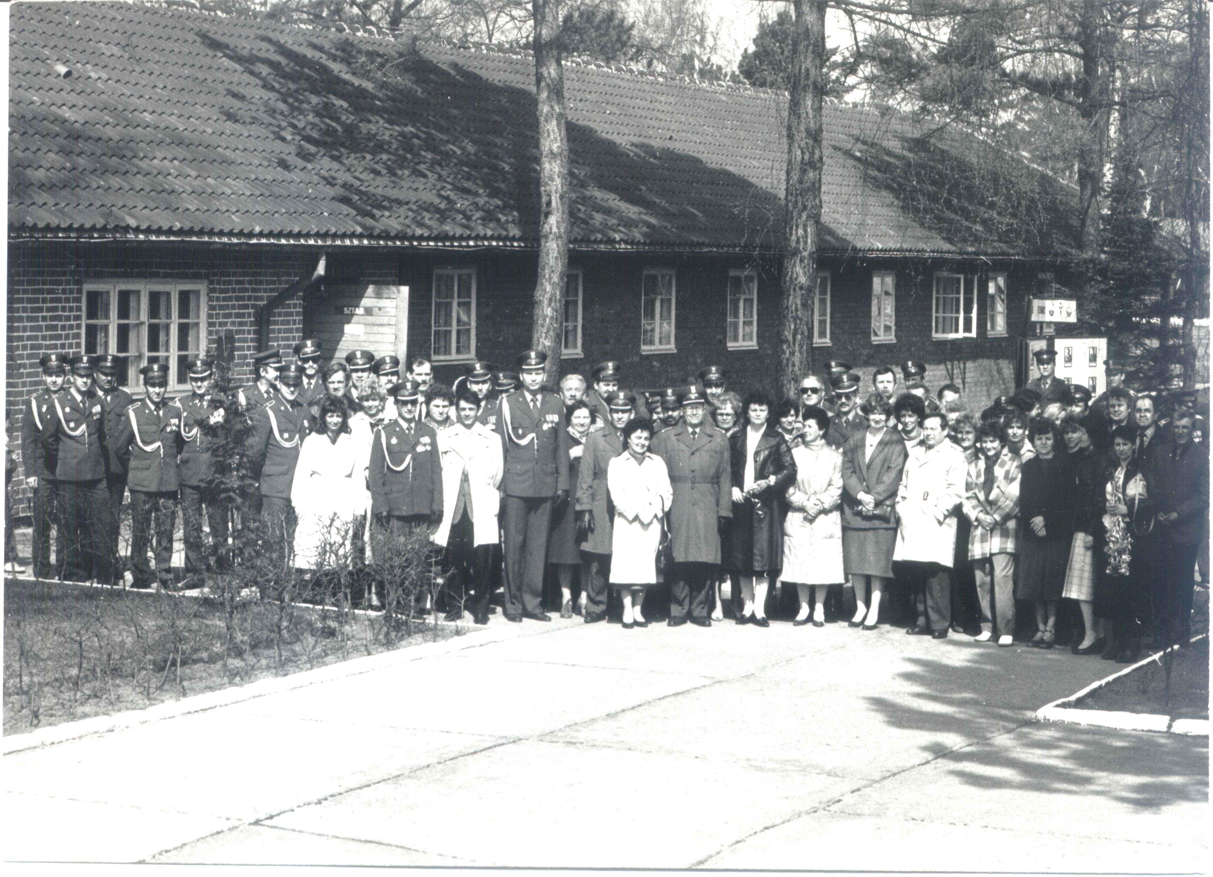 Budowo: Przed sztabem 7 drt, kadra zawodowa, byli żołnierze, dowódcy i rodziny podczas uroczystości 30 lecia jednostki. W środku, na tle drzewa - dowódca, mjr dypl. Marek Ojrzanowski, z lewej - szef sztabu, mjr Tadeusz Szczypiorowski.